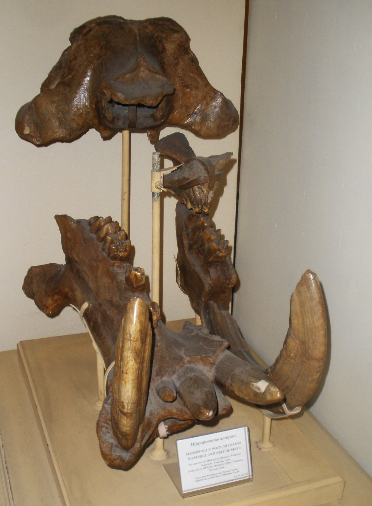 Fossil of Hippopotamus, an extinct mammal- Took the picture at Museo di Paleontologia di Firenze